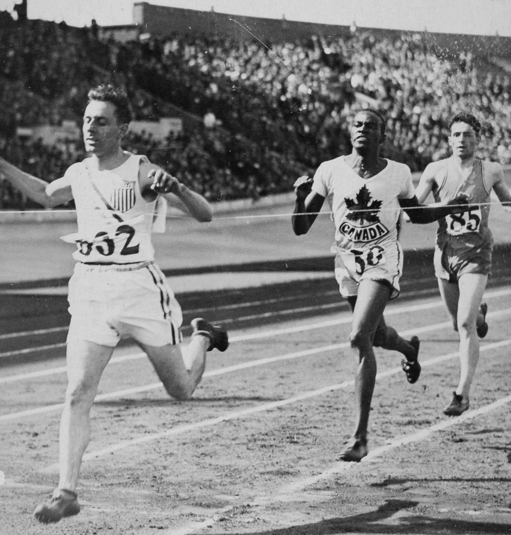 Sport. Sport, Olympische Spelen Amsterdam, 1928 : Opname van de eerste halve finale van de 800 meter hardlopen (mannen). De Amerikaan L. Hahn wint voor de Canadees Edwards en de Fransman Martin.